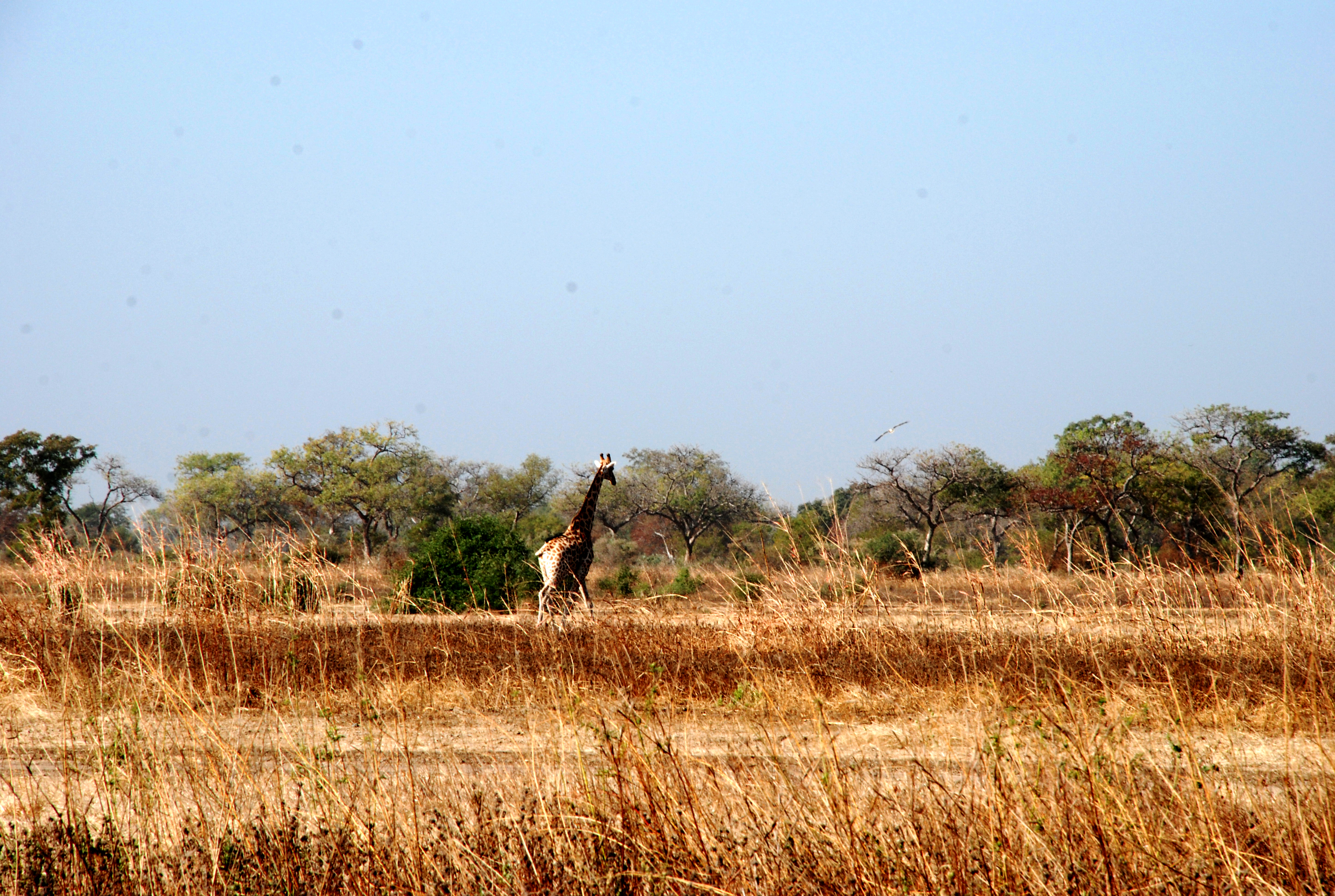 Parc de Waza dans le nord Cameroun